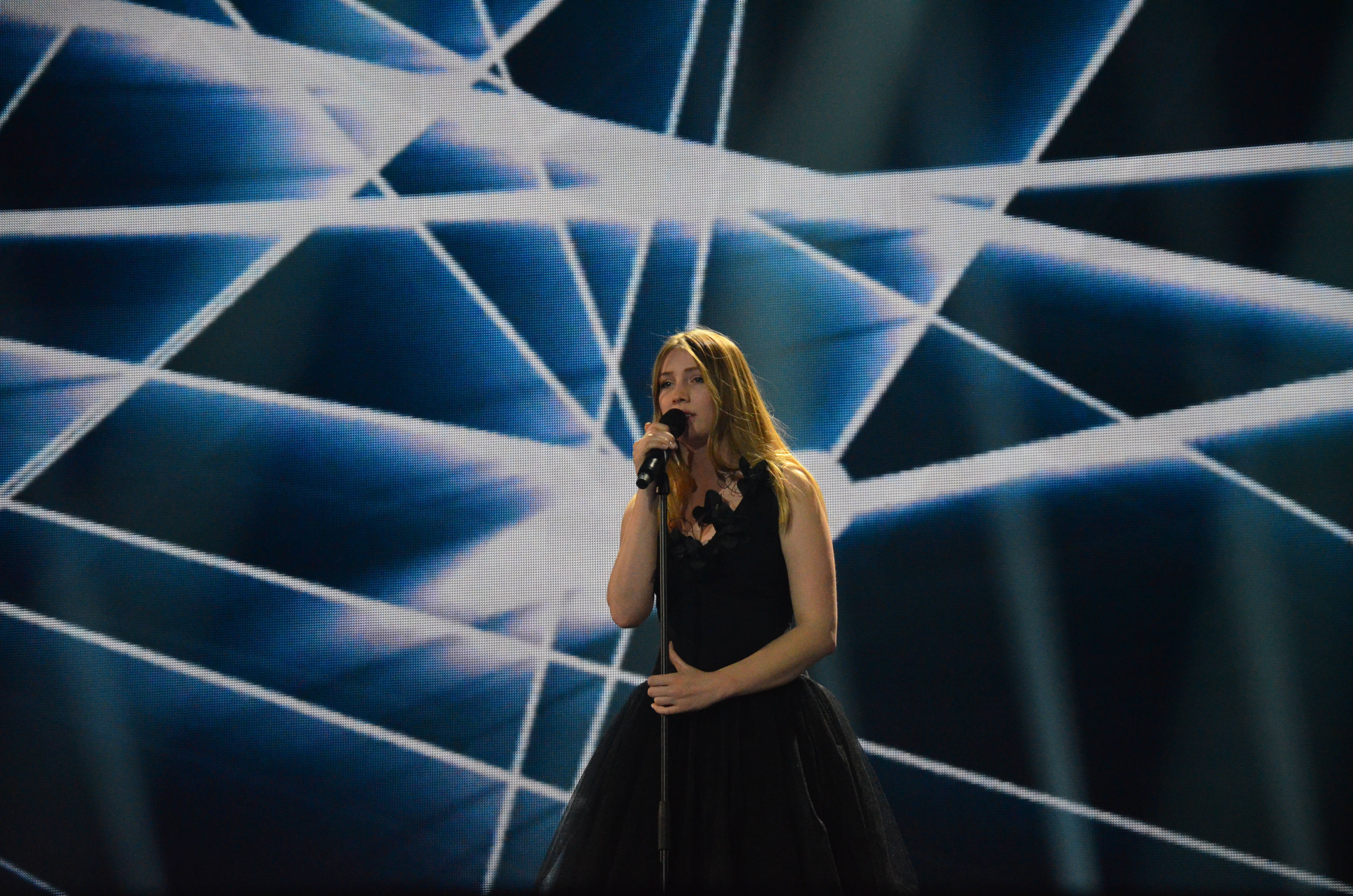 12 травня. Генеральна репетиція фіналу Євробачення 2017. Blanche (Belgium).